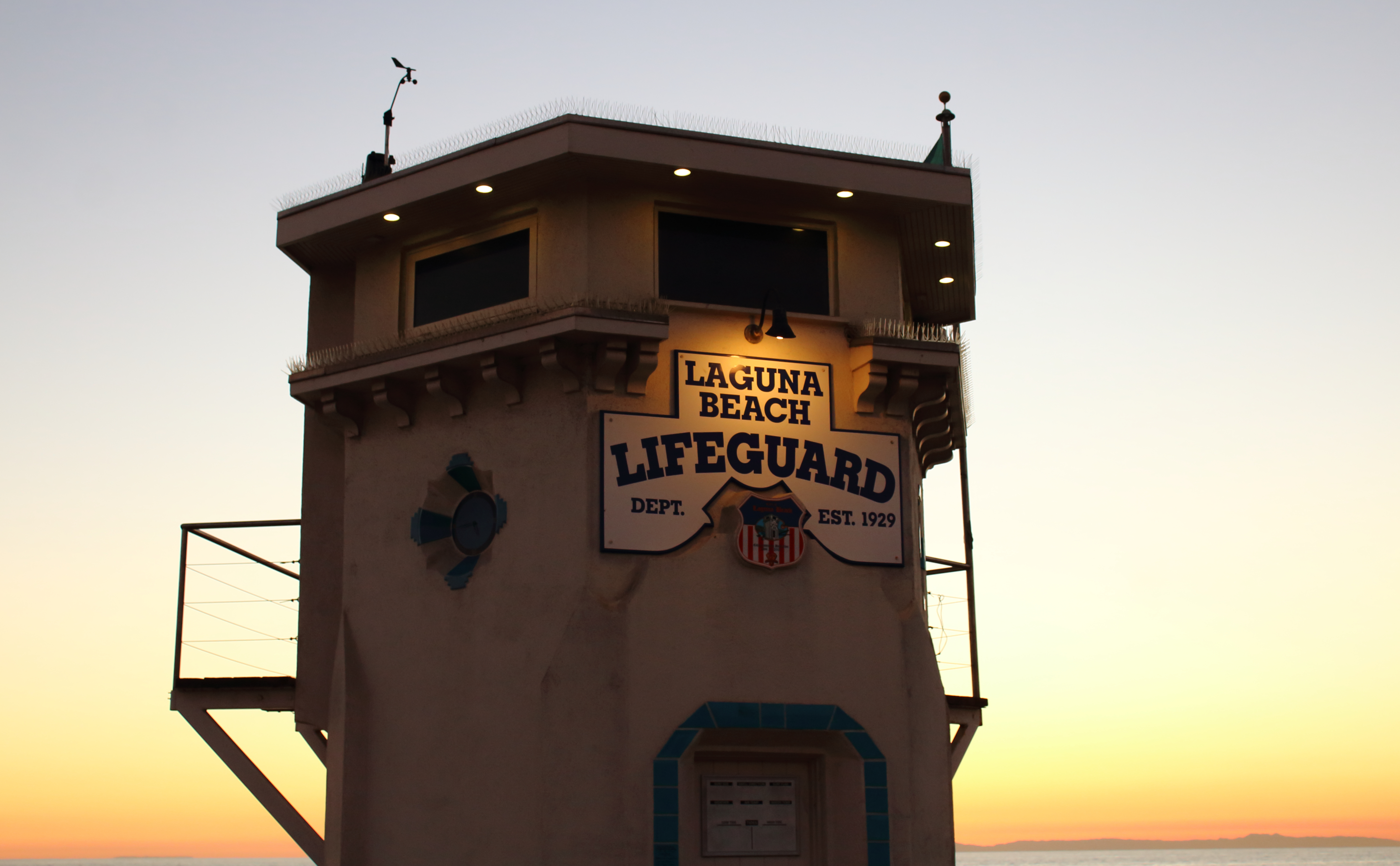 Salvavidas en Laguna Beach, California.